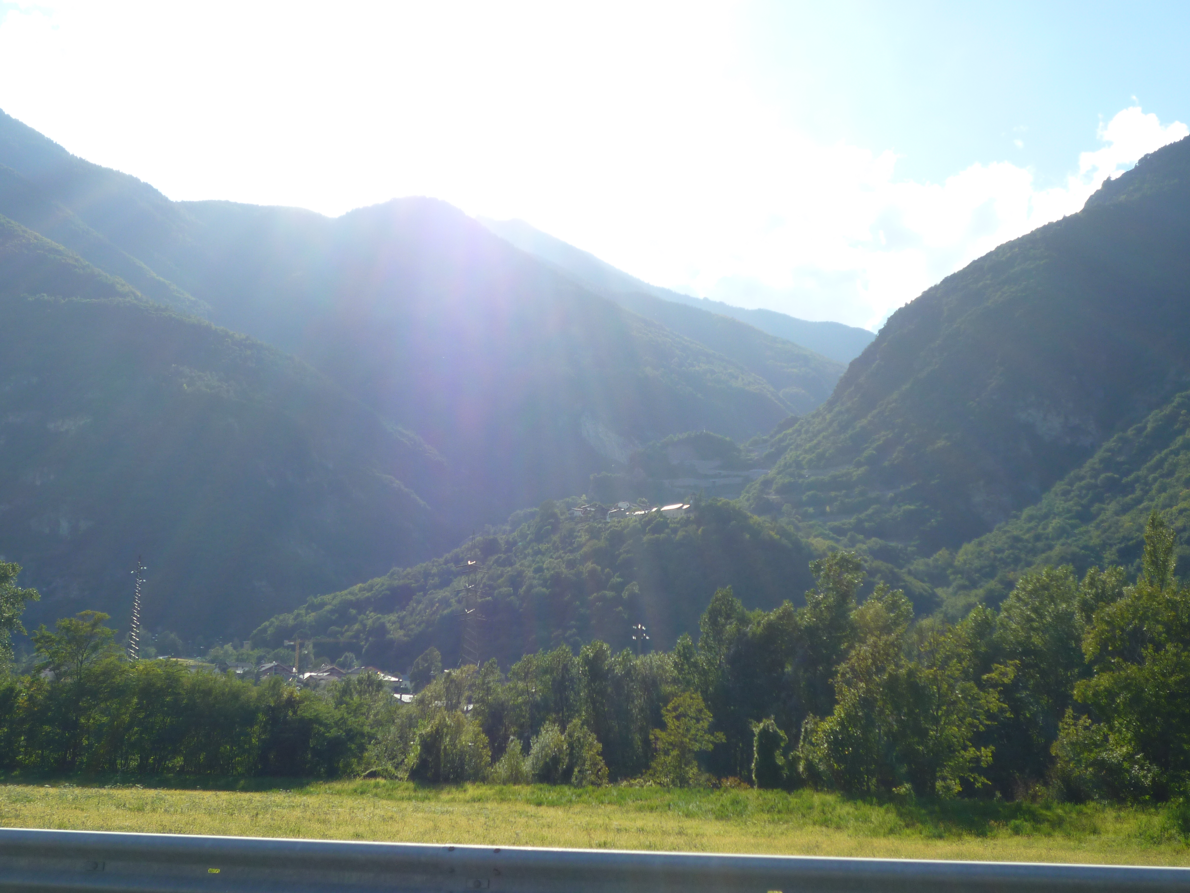 Panorama de la commune de Champdepraz (Vallée d'Aoste - Italie)